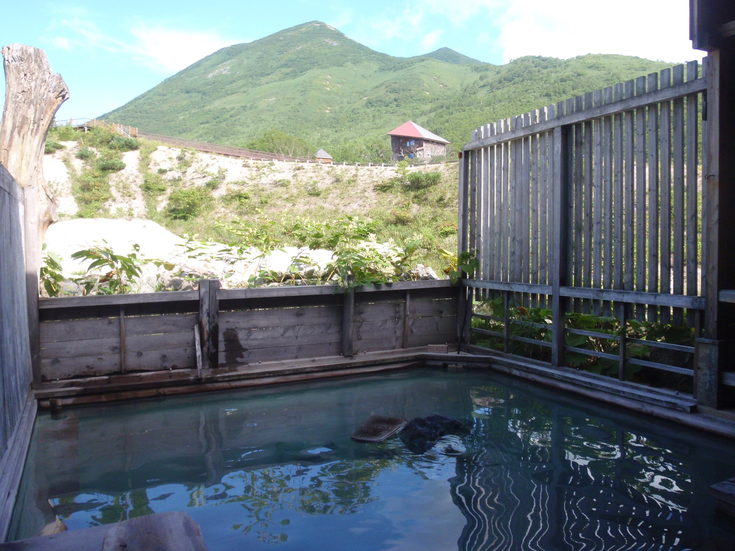 五色温泉旅館露天風呂